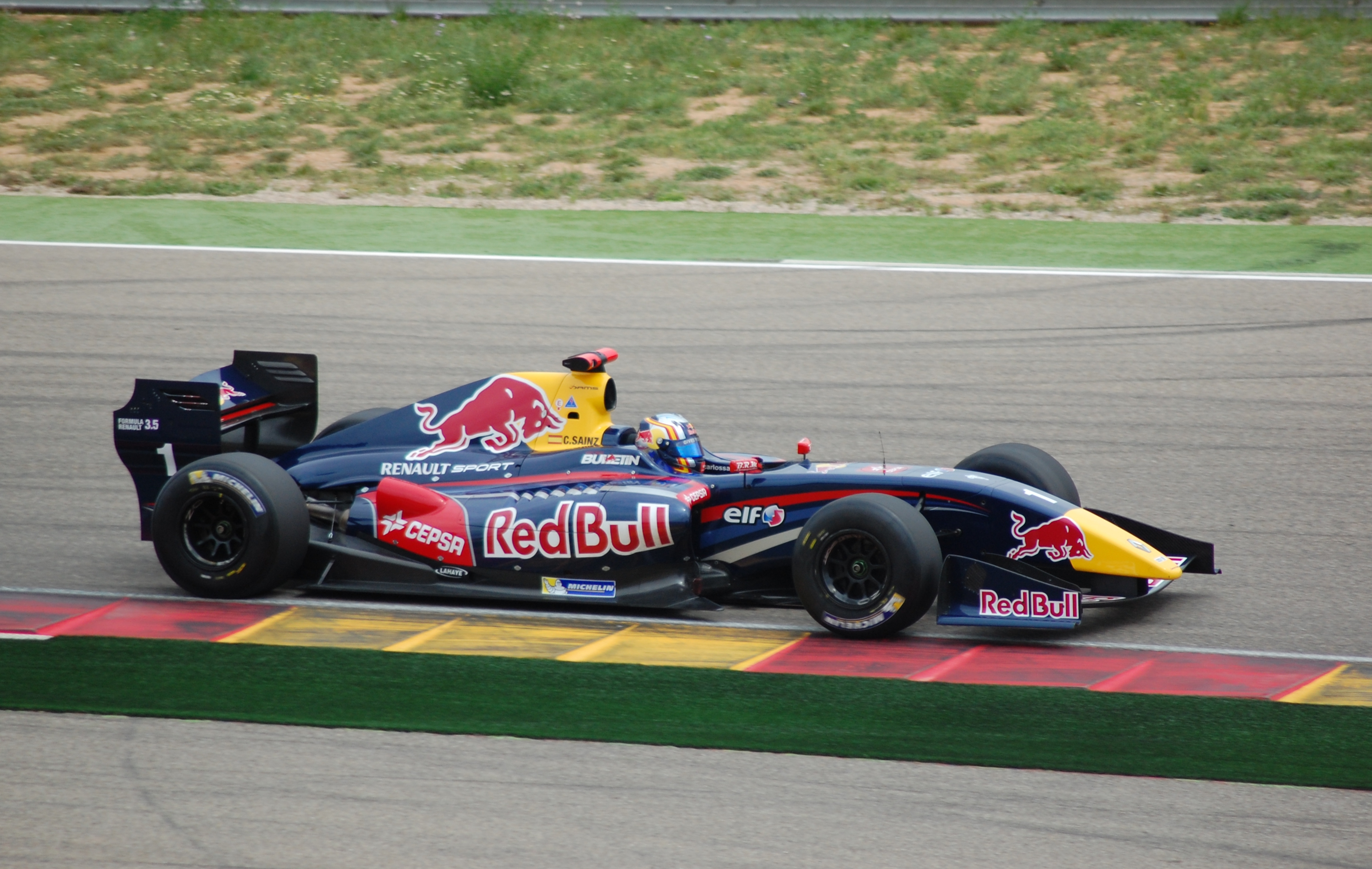 Aragonés: Carlos Sainz Jr en Motorland